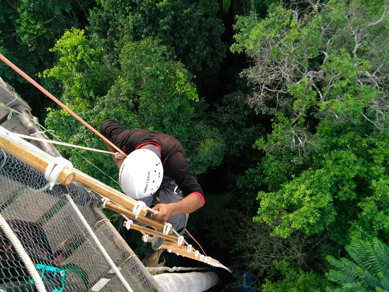 Parque Estadual do Chandless, no Acre.